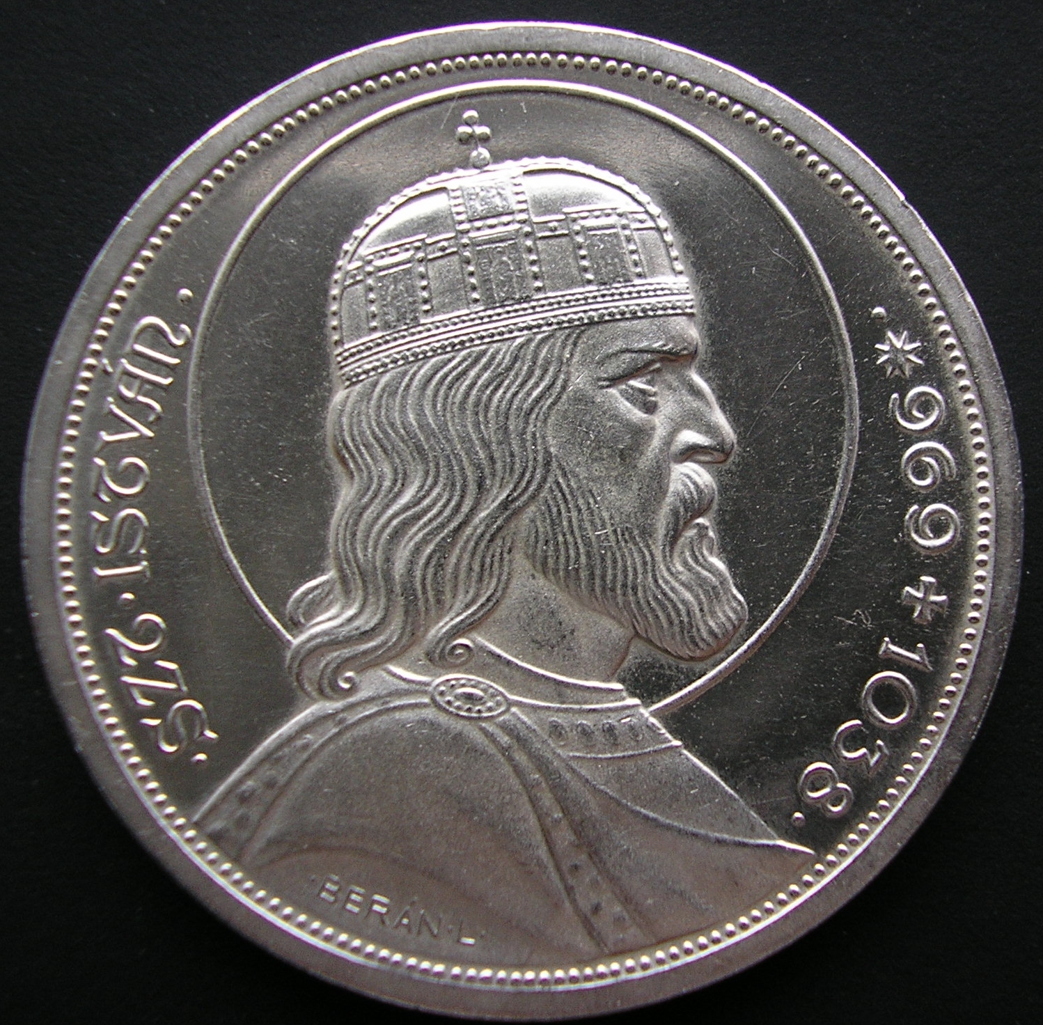 Hungary 5 Pengő Szt. István 1938